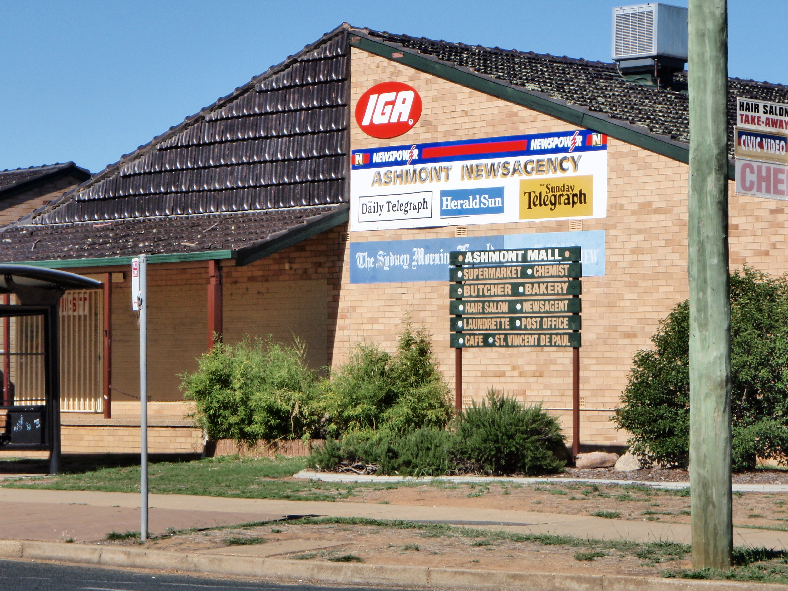 Ashmont Mall - Ashmont, Wagga Wagga